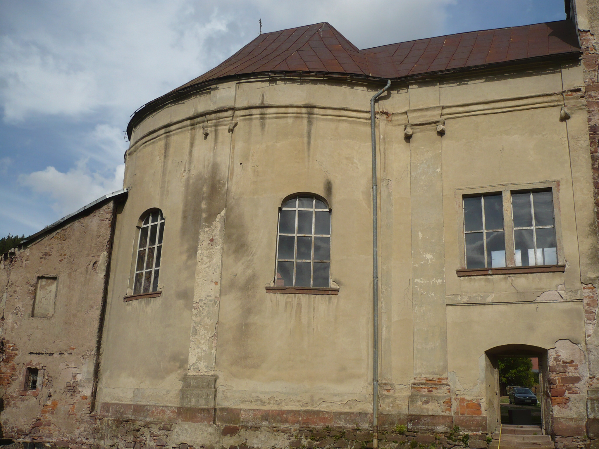 Sarny. Kaplica